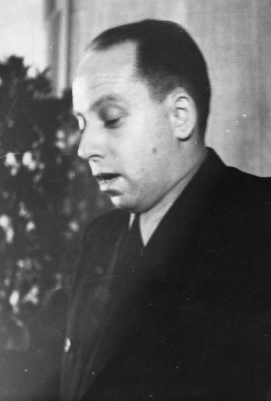 Alexander Dymschitz Oberstleutnant Alexander Dymschitz (SMA) Aufn. Illus/ Henckels 12000-48 [Prof. Dr. Alexander Dymschitz (Porträt)] Abgebildete Personen: Dymschitz, Alexander Prof. Dr.: Kulturoffizier der SMA, Literaturkritiker, Sowjetunion (PND 118528424)